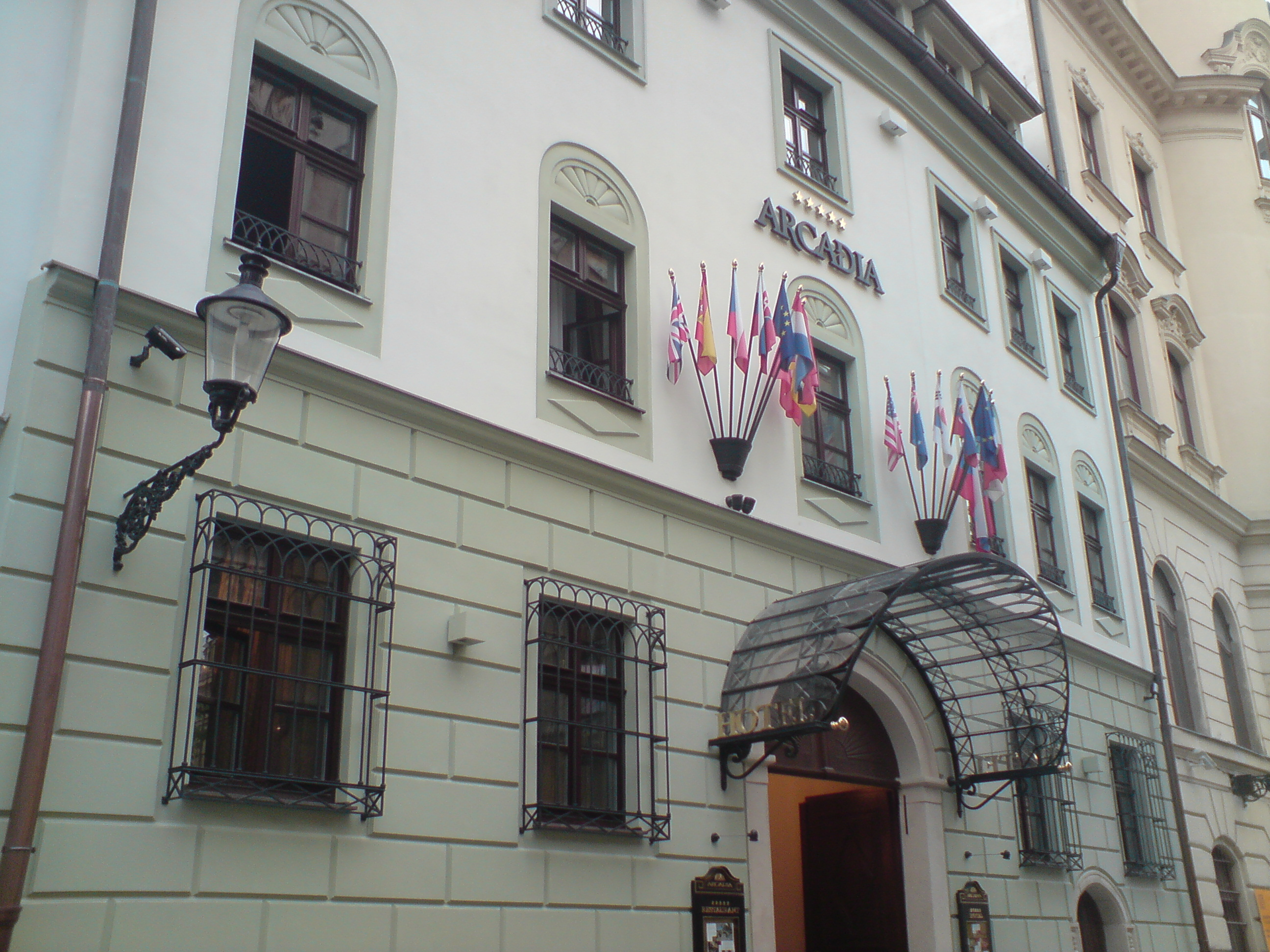 Hotel Arcadia Bratislava *****